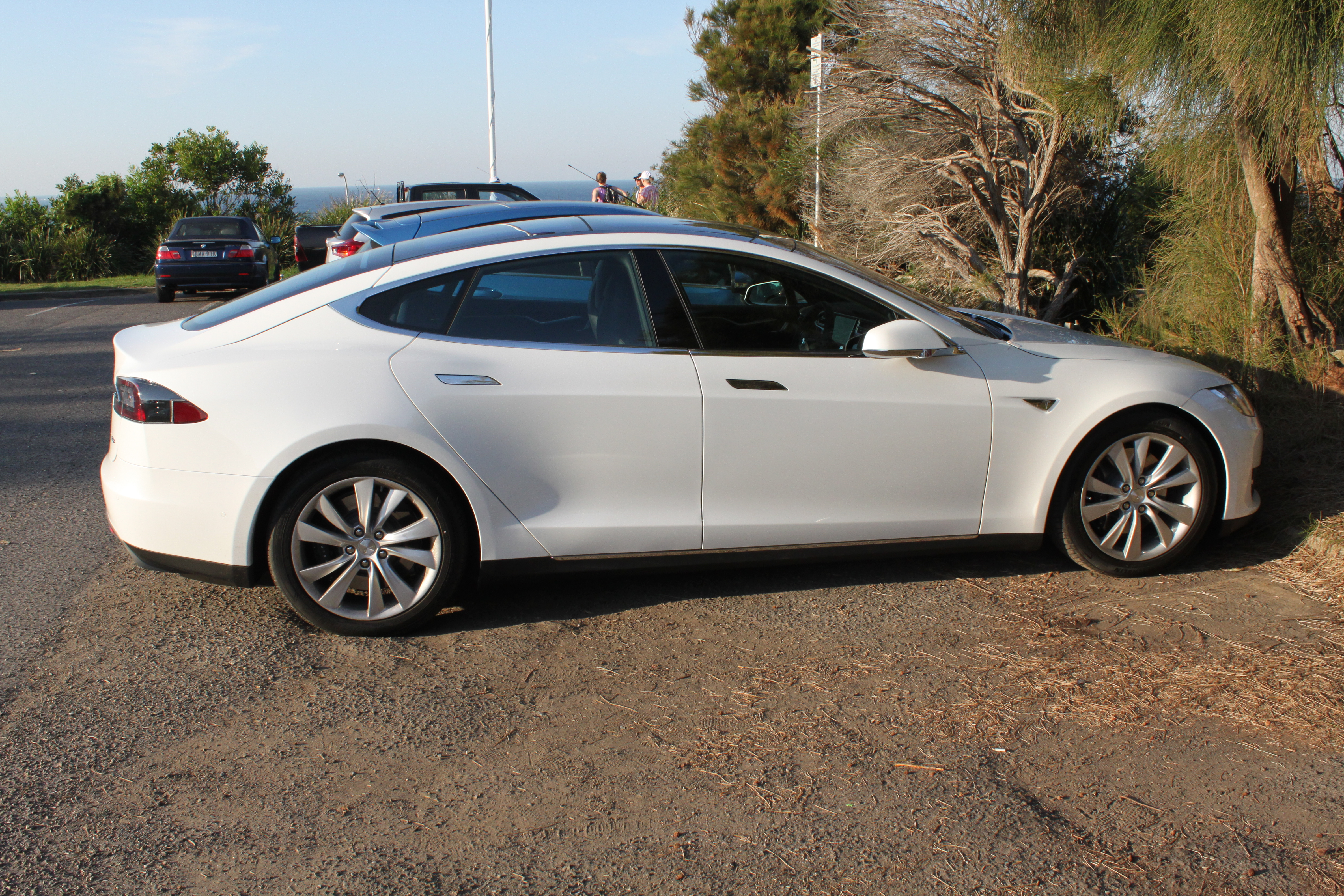 Tesla Model S 90D